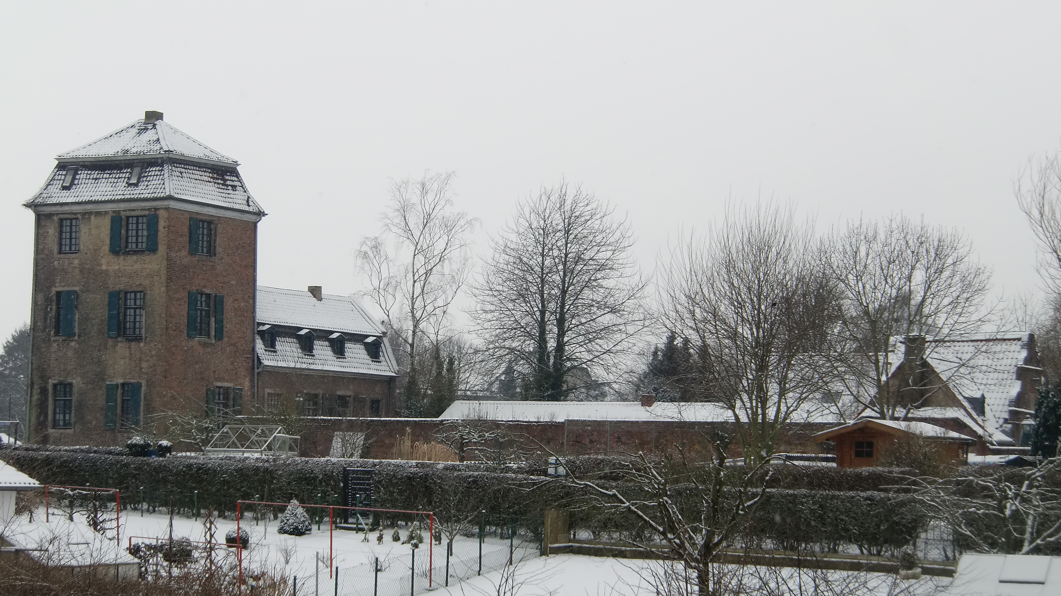 Der Issumer Turm in Krefeld-Linn